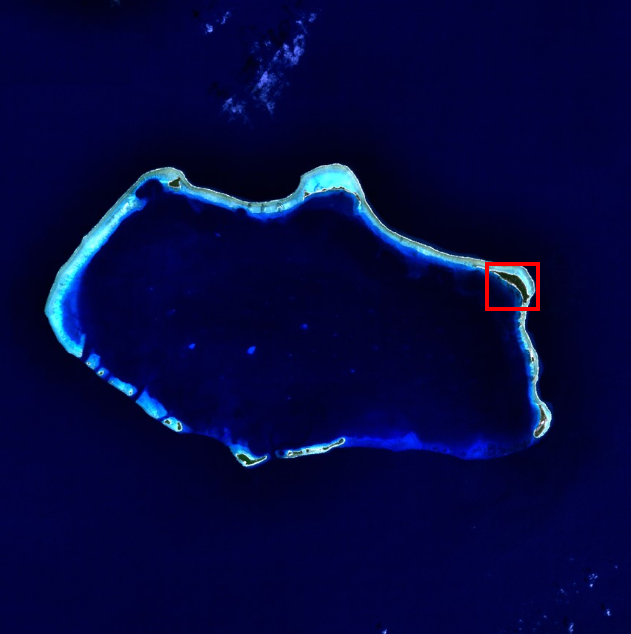 Ligging van het eiland Bikini in het atol Bikini. Gebaseerd op "juiste" afbeelding. Eigen werk, vrij.